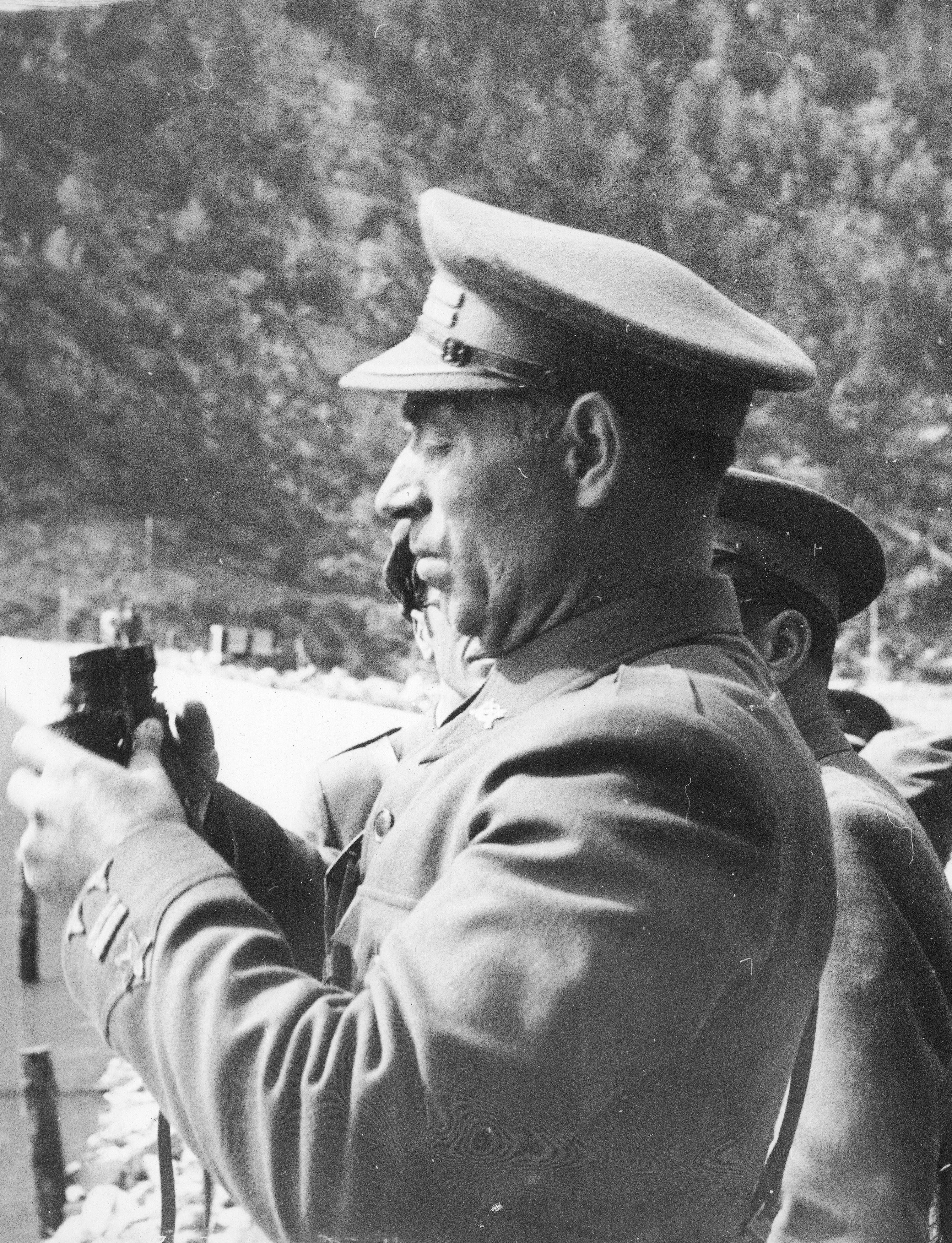 Antonio Beltrán Casaña, comandante de la 43.ª División republicana, en Bielsa.